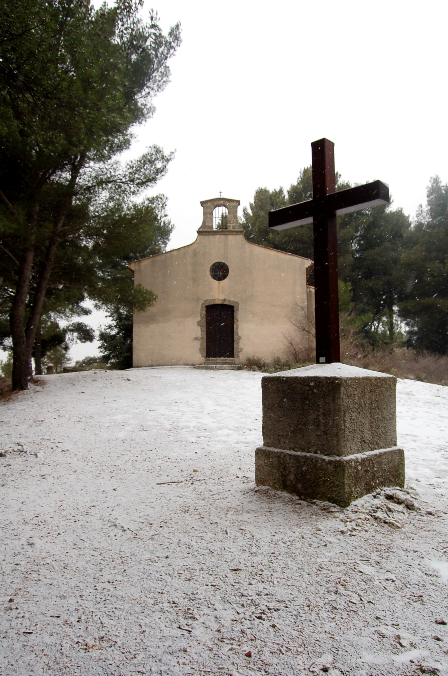 Chapelle Notre-Dame de l'Espérance à Bouc-Bel-Air (13, France), lors de l'épisode neigeux de Février 2012.